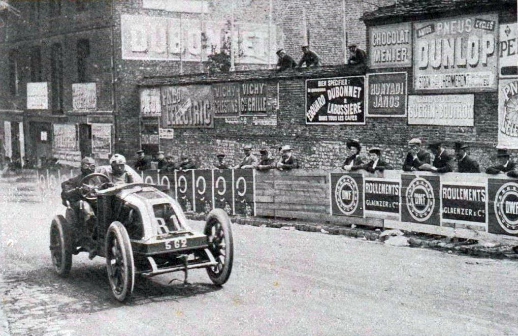 Grand Prix de l'ACF 1907, Ferenc Szisz à la sortie d'Eu.